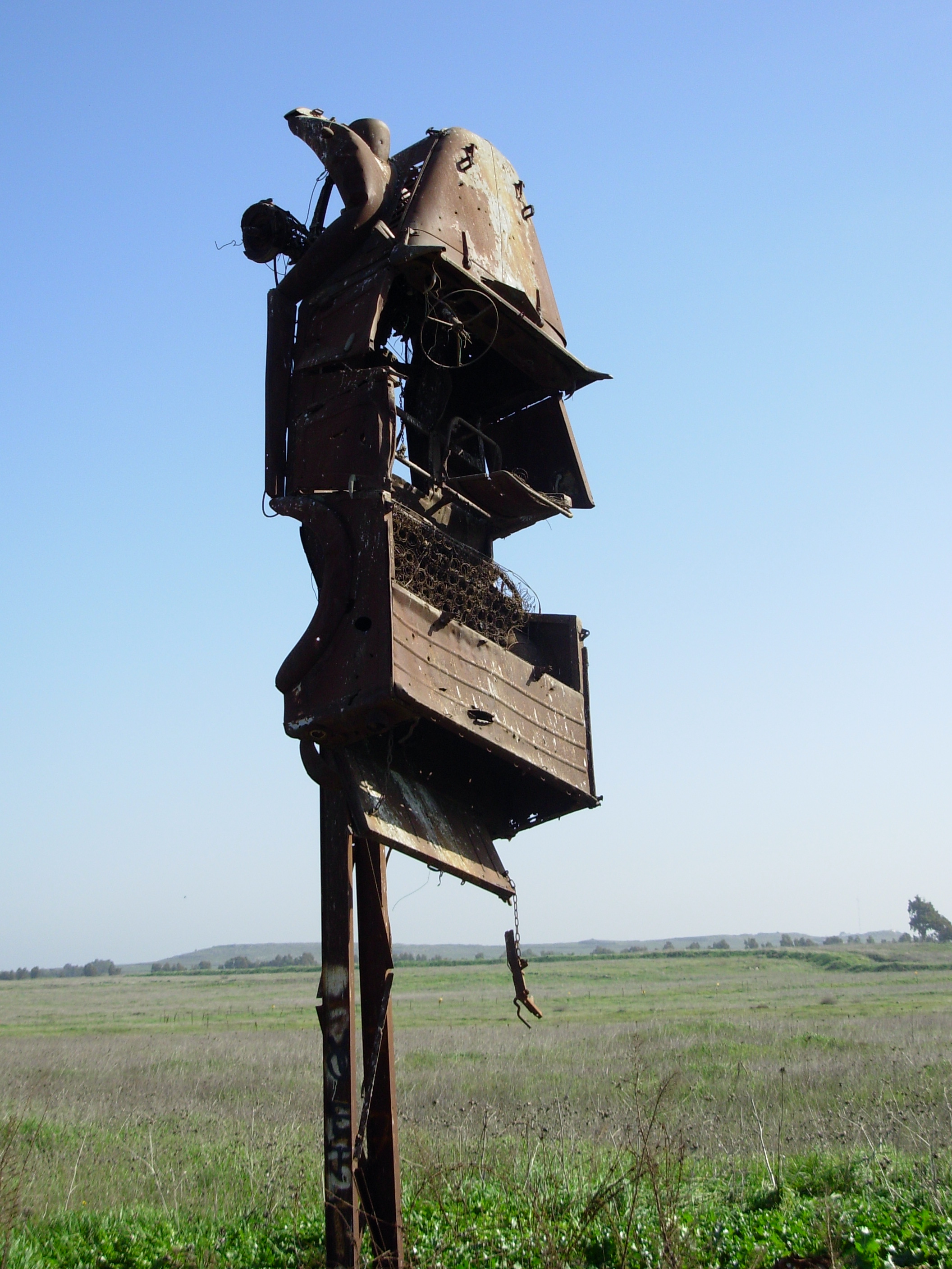 צומת "אל תקרא לי שחור"